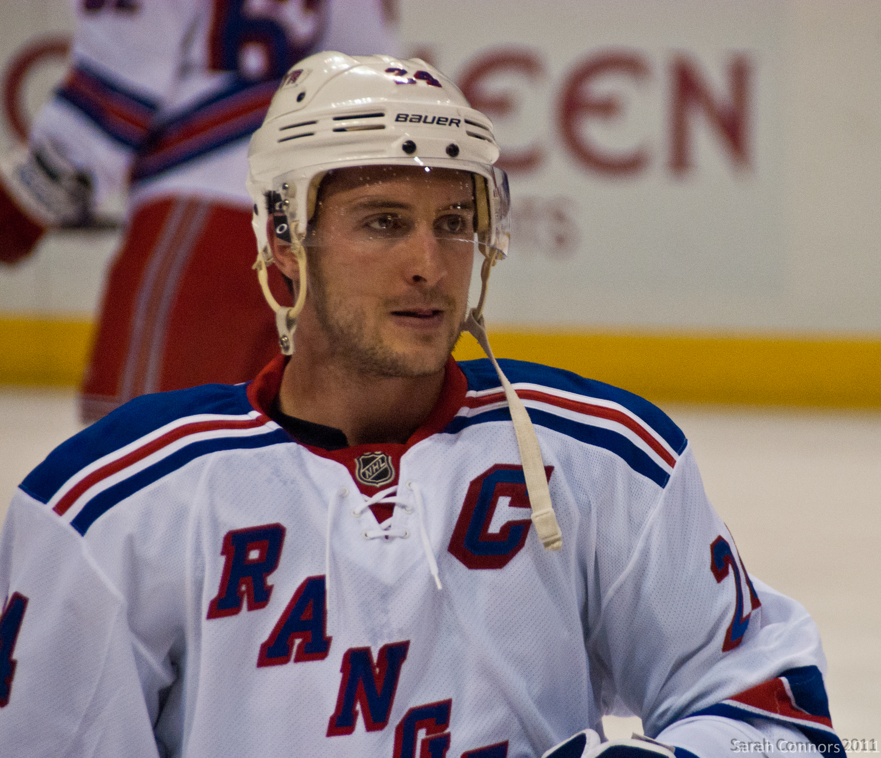 Blues vs. Rangers-8770.jpg